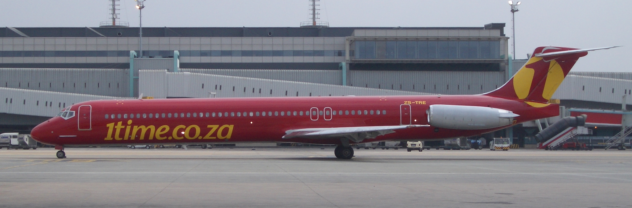 1time McDonnell Douglas MD-82 am Flughafen Johannesburg Sonstiges: Zur freien Verwendung